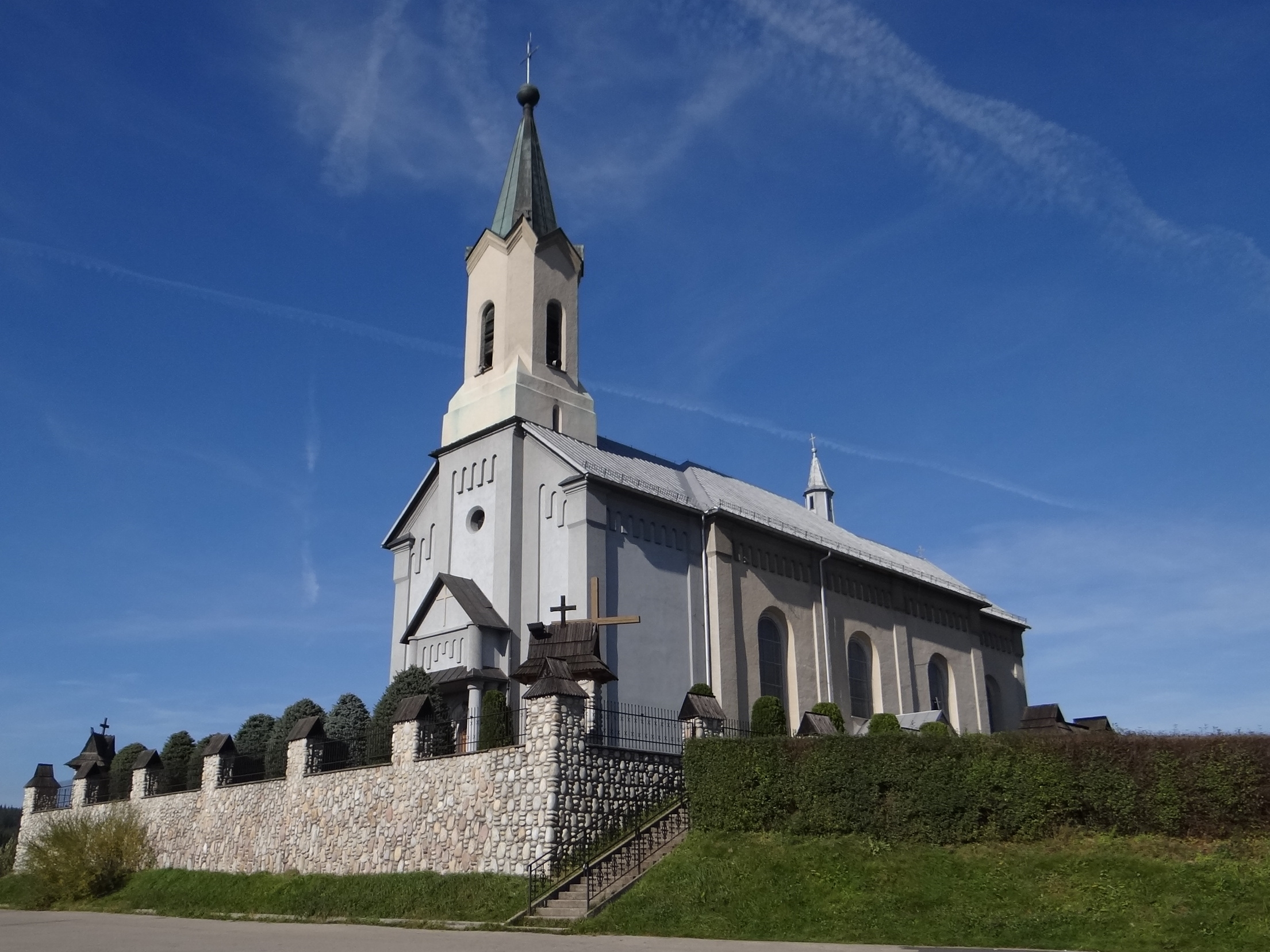 Piekielnik 331 - rzymskokatolicki kościół parafialny pw. św. Jakuba Apostoła, 1878